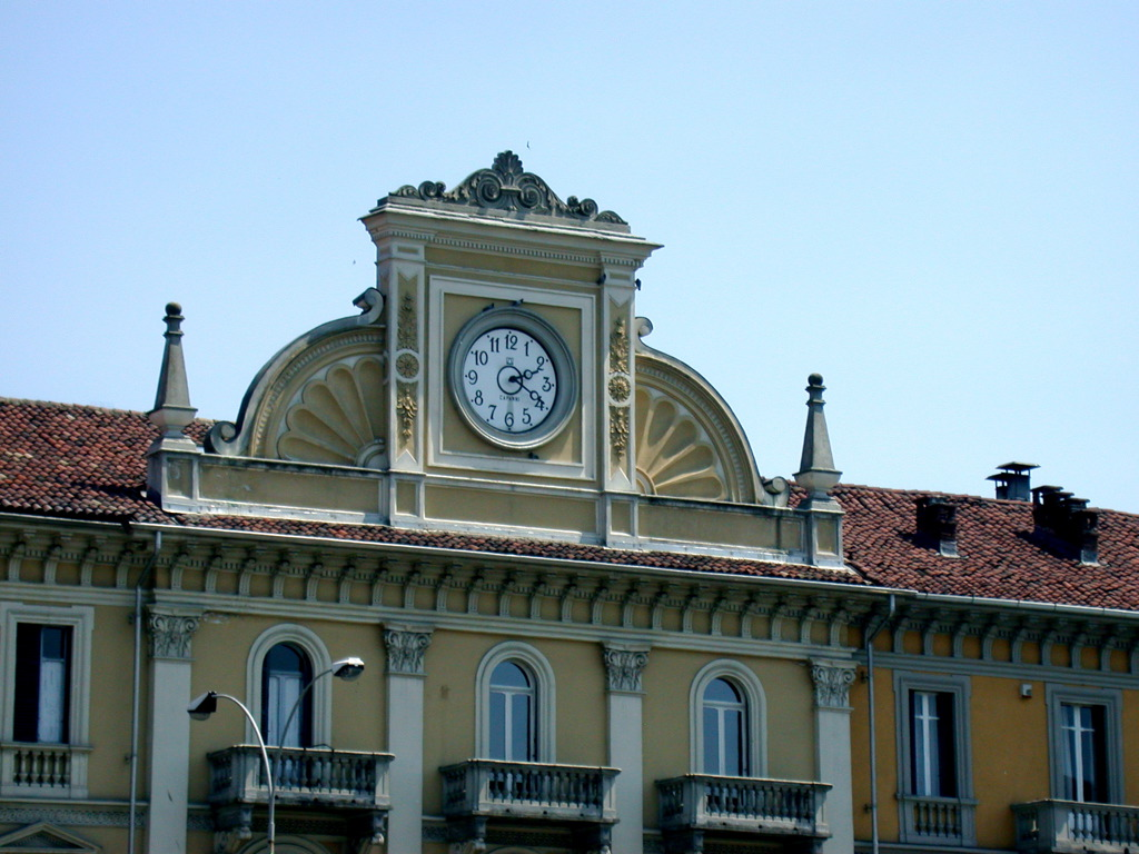 Alessandria, Piemonte, Italia42!